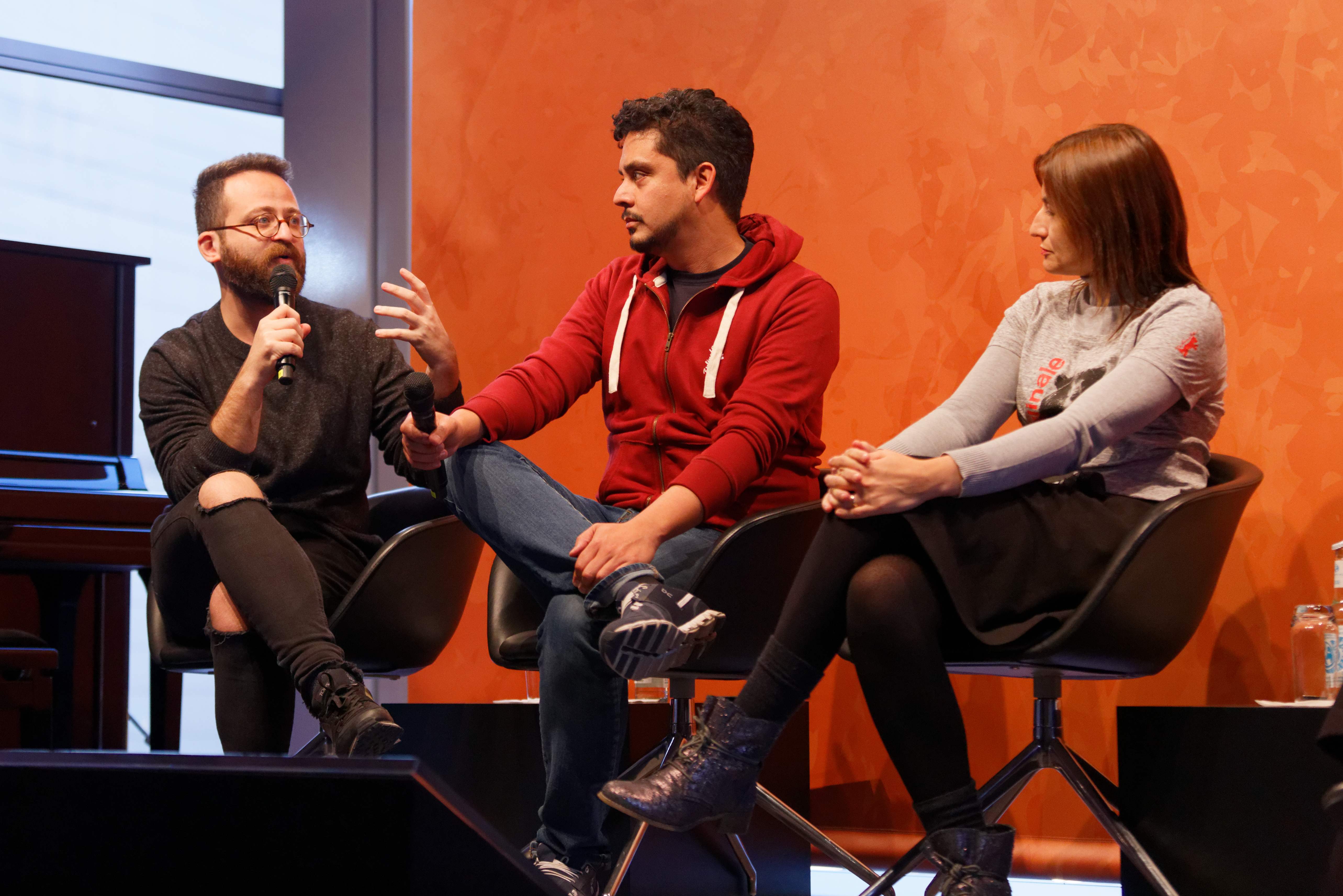 Mahmoud Sabbagh, Jayro Bustamante und Christiane Oliveira beim Talk der GWFF-Jury in der Audi Lounge zur Berlinale 2017